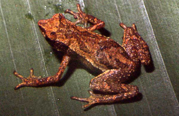 Dendrophryniscus berthalutzae